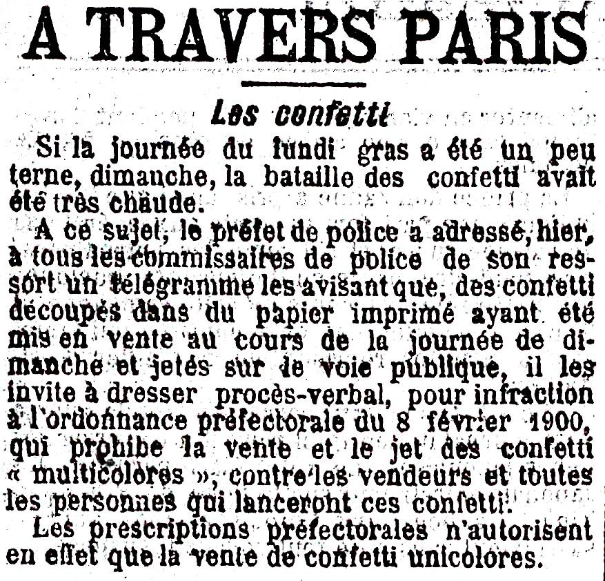 Article à propos des confettis au Carnaval de Paris en 1905.